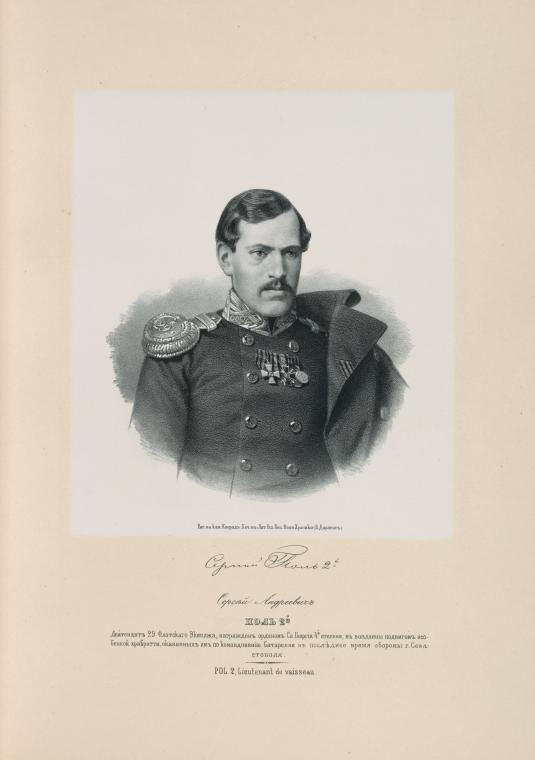 лейтенант Сергей Андреевич Поль